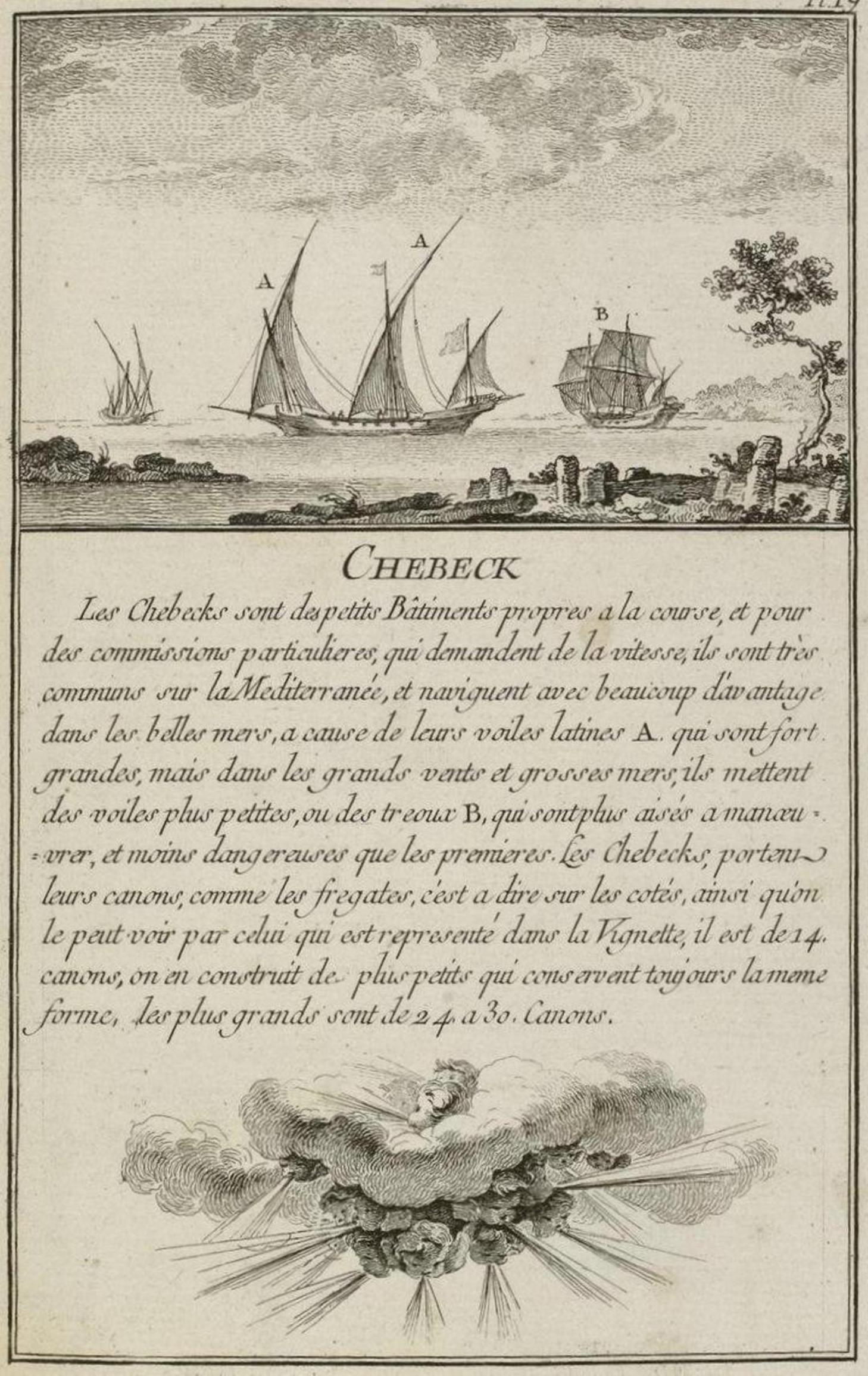 Représentation d'un chébec tirée de Marine militaire, ou Recueil des différens vaisseaux qui servent à la guerre, suivis des manœuvres qui ont le plus de rapport au combat ainsi qu'à l'attaque et la défense des ports par N. Ozanne.